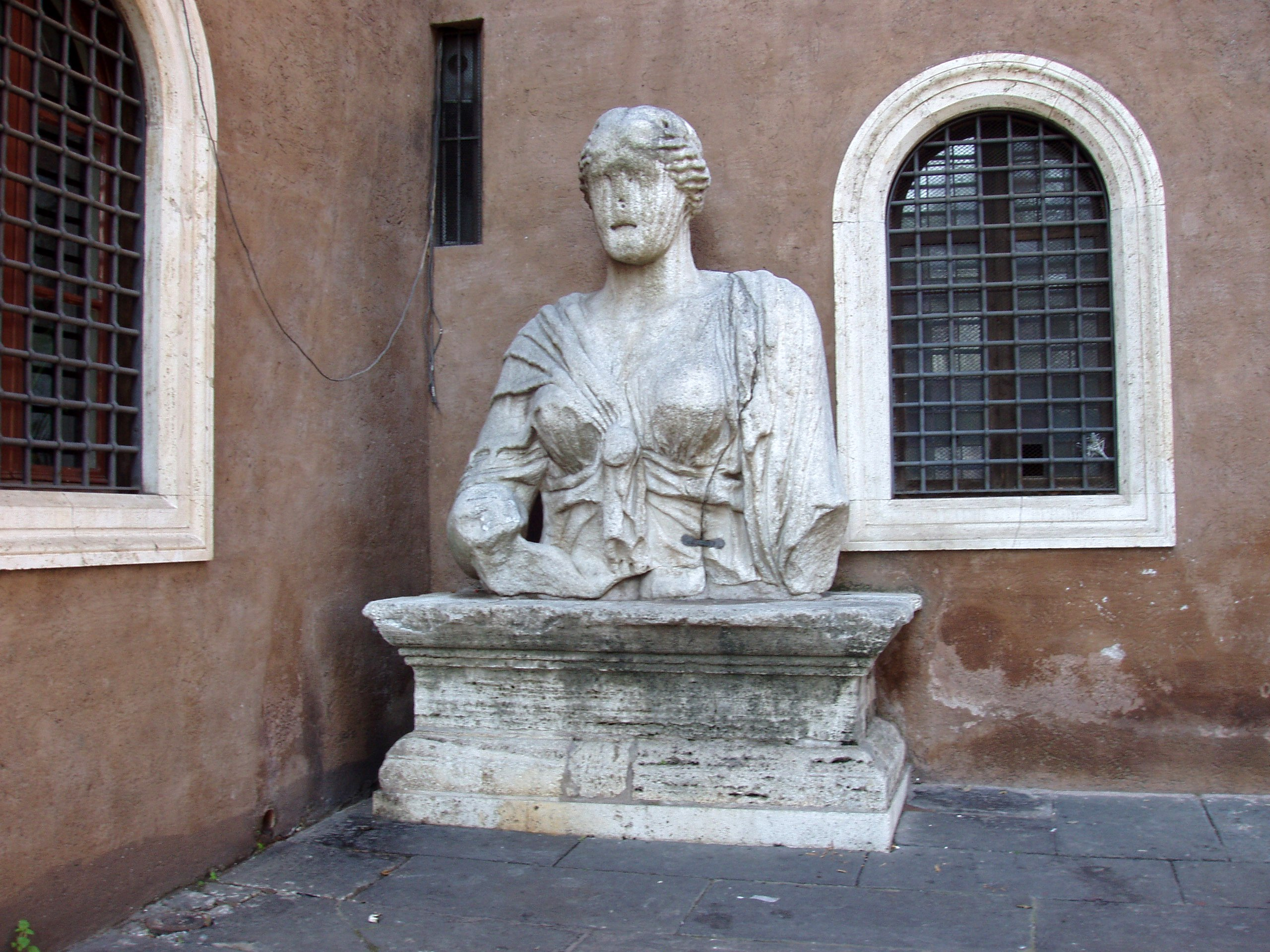 Madama Lucrezia statua parlante This is a photo of a monument which is part of cultural heritage of Italy.